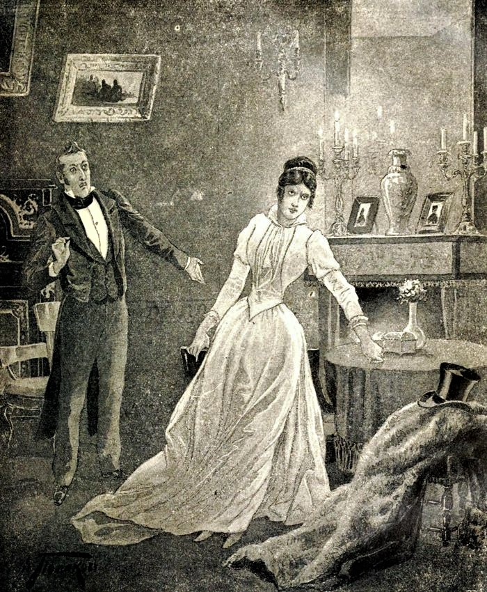 Nell'illustrazione di V. A. Poljakov sono raffigurati Arbenin e Nina, protagonisti del dramma in versi di Lermontov «Un ballo in maschera»